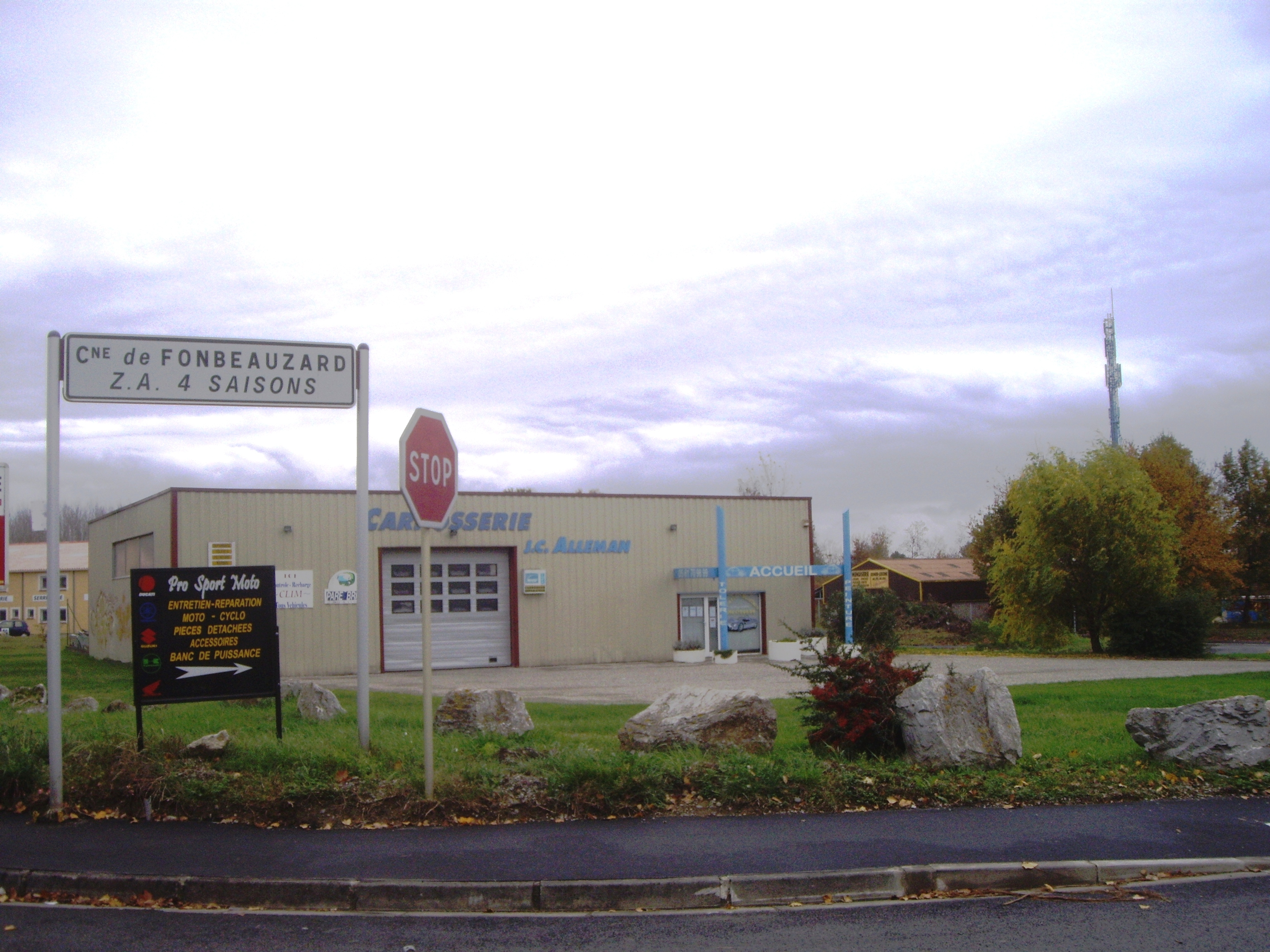 ZAC 4 saisons